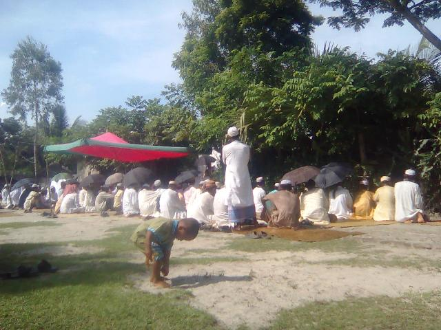 বাংলাদেশের প্রত্যন্ত অঞ্চলের একটি গ্রামের ঈদের নামাজ পড়ার দৃশ্য।